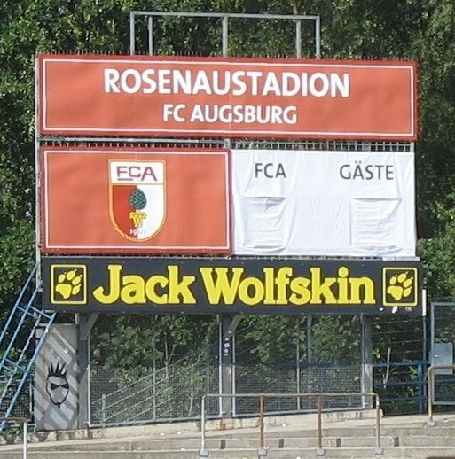 Rosenaustadion